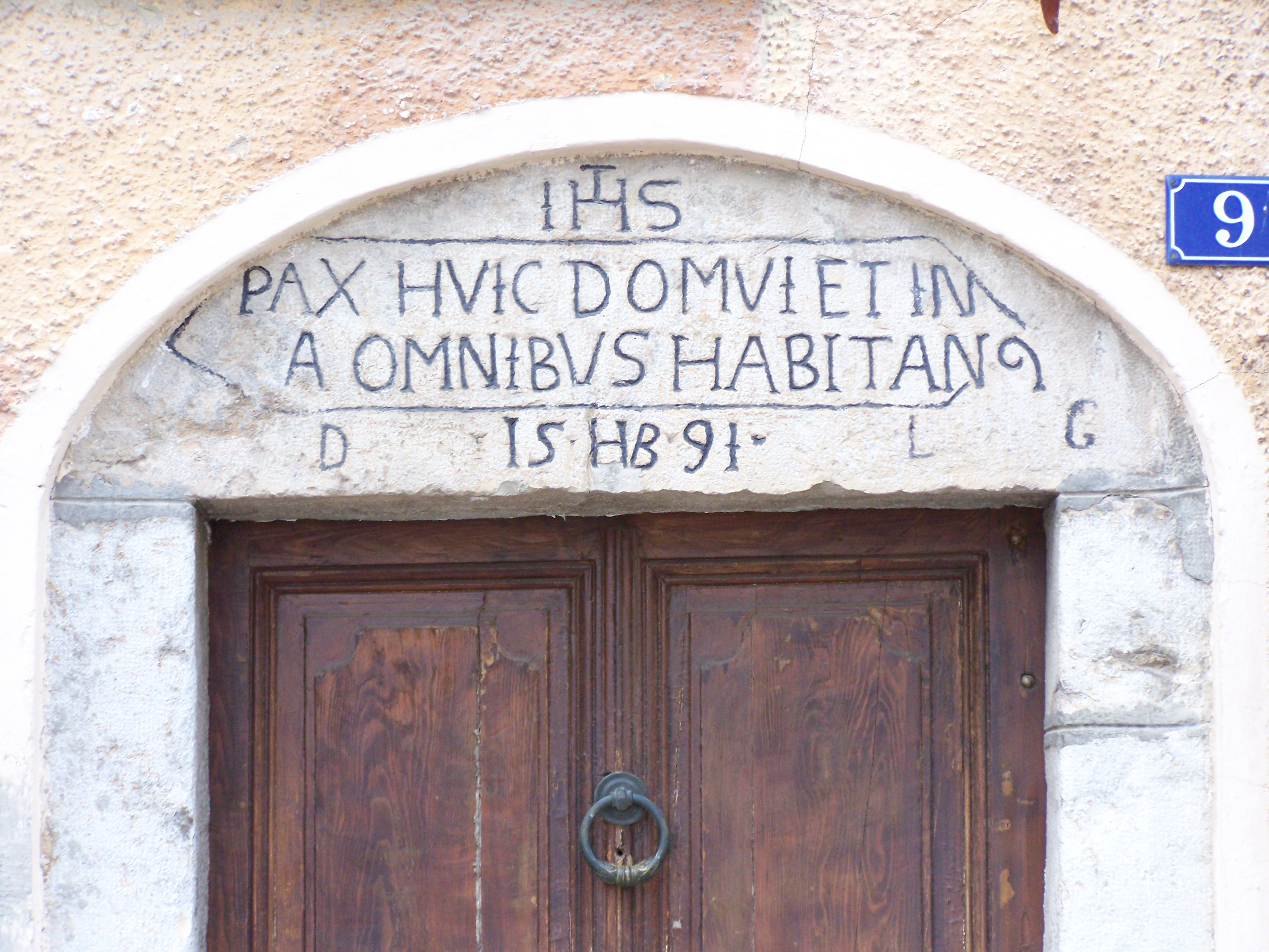 Linteau datant de 1591 d'une maison du village de Levens (Alpes-Maritimes, France). La phrase en latin ("Pax huic domui et in ea omnibus habitantibus") signifie : "Paix à cette maison et à tous ses habitants". IHS surmonté de la croix est un monogramme latin pour Jésus : "Iesus Hominum Salvator" ("Jésus Sauveur des hommes").